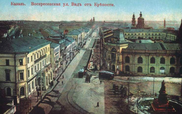 Казань. Воскресенская улица. Вид от крепости.